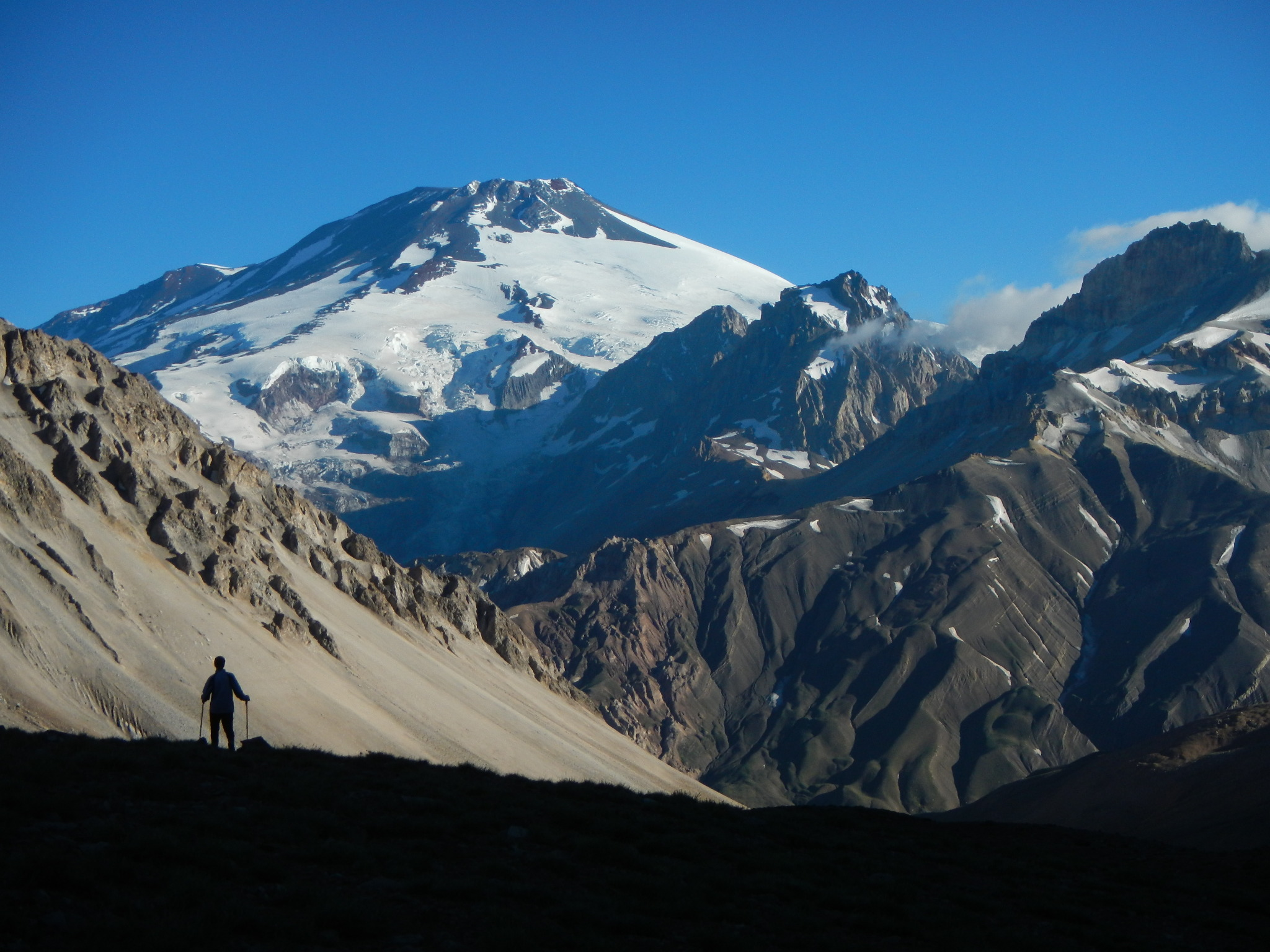 El volcán San José es una enorme mole cubierta de hielo por su cara sur.